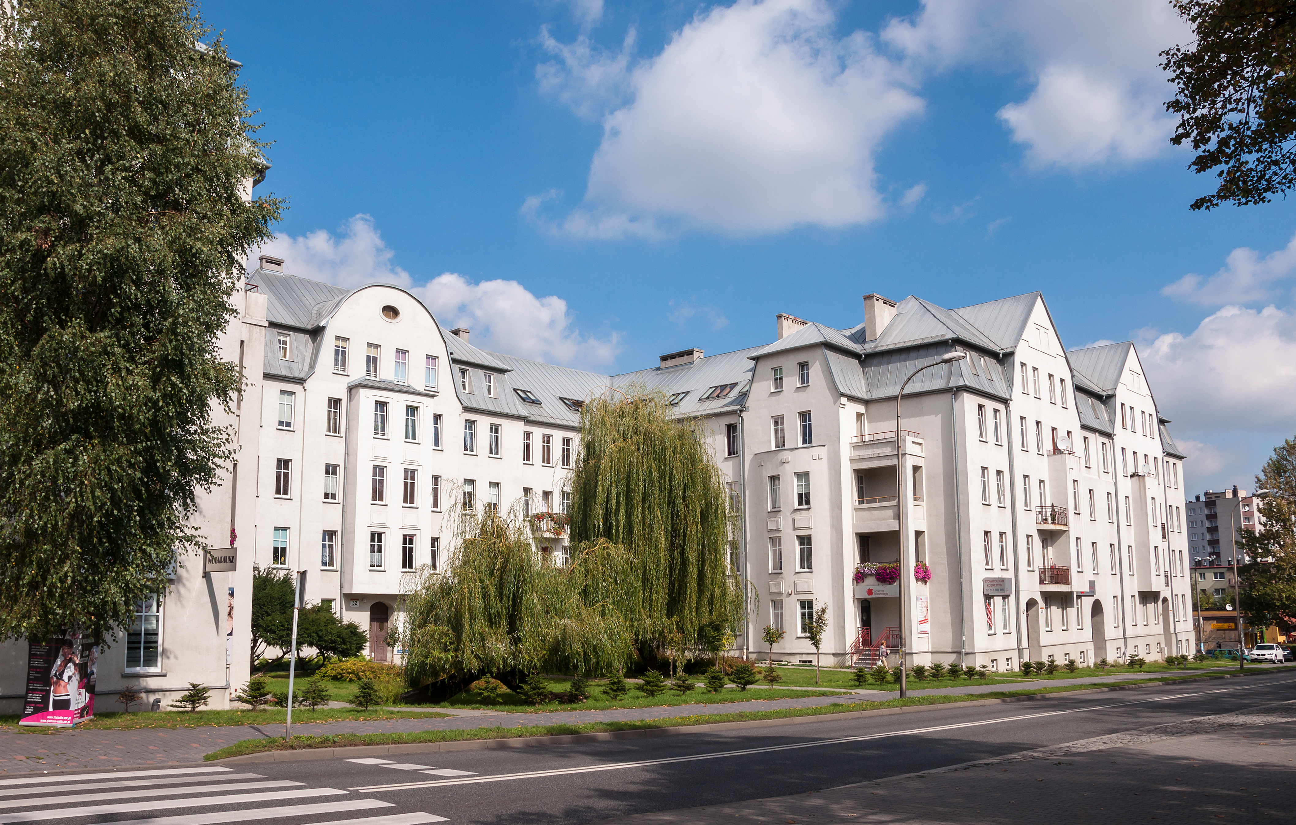 Mysłowice, ul. Mikołowska 26-36. Dom (dec. 6 domów - blok zabudowy), 1915.